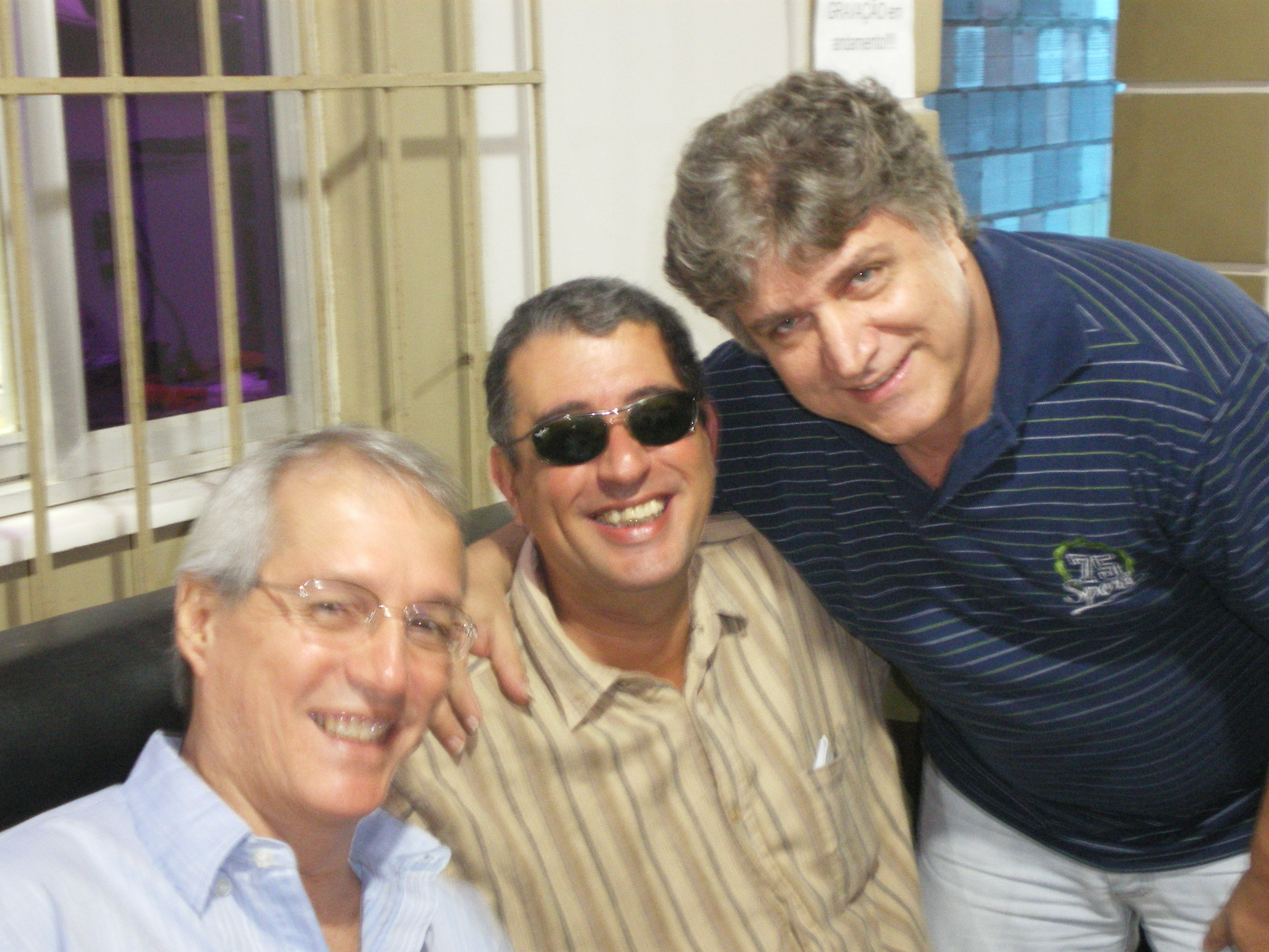 Gravação do sambabook João Nogueira no Rio de Janeiro. Na foto, Alceu Maia, Didu Nogueira e Jorge Simas.